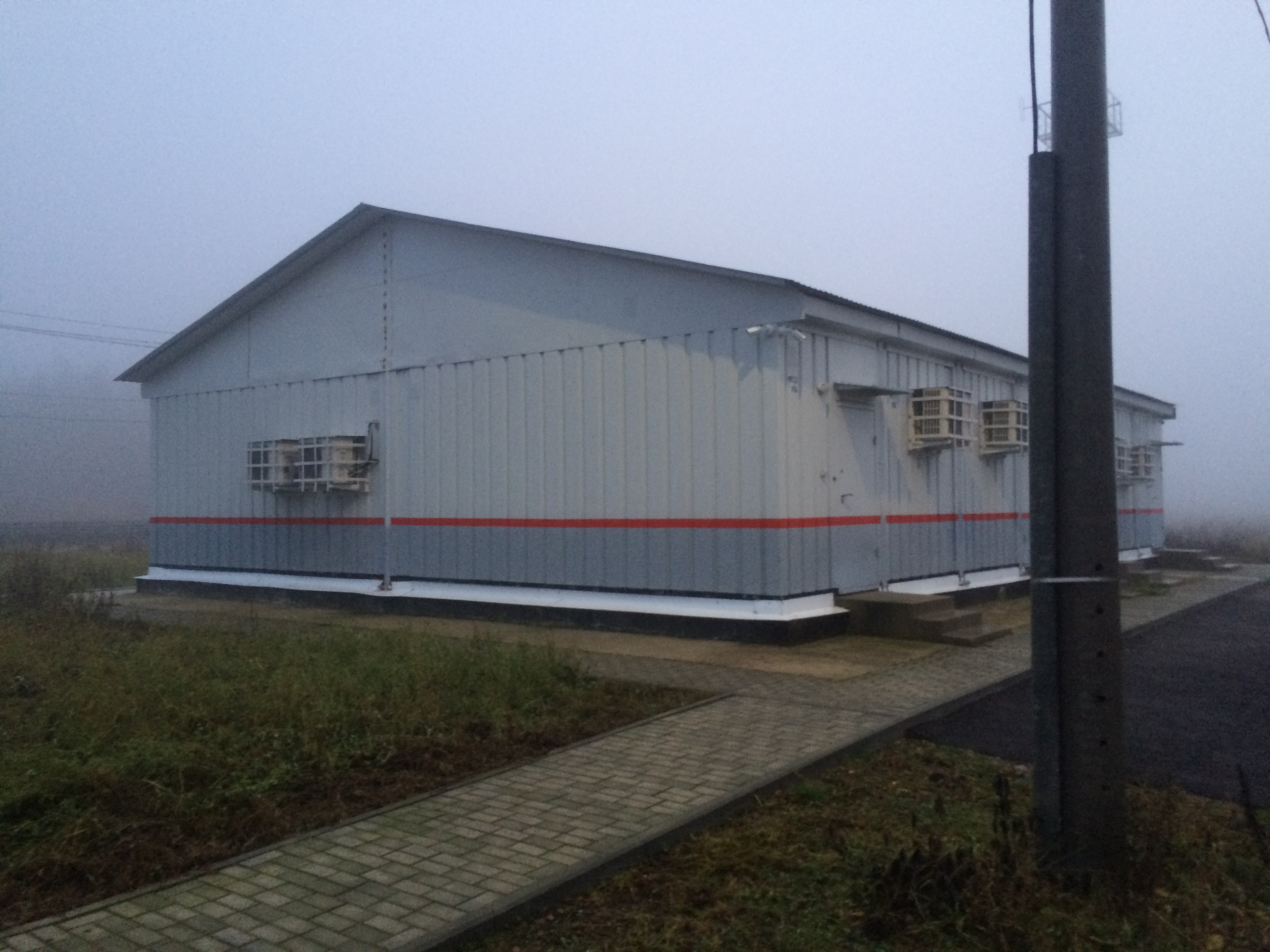 Ермилово